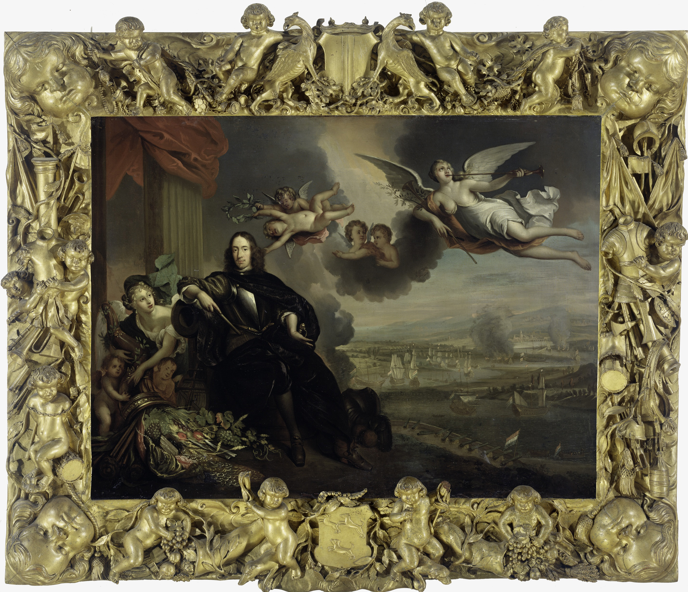 Verheerlijking van Cornelis de Witt, met op de achtergrond de tocht naar Chatham (juni 1667). Links een hoorn des overvloeds met symbolen van de welvaart en rijkdom van het land. In de lucht Faam met bazuinen en putti met een lauwerkrans. De Witt is voorgesteld in wapenrusting en met commadostaf als teken van zijn functie als gevolmachtigde van de Staten-Generaal bij de vloot.